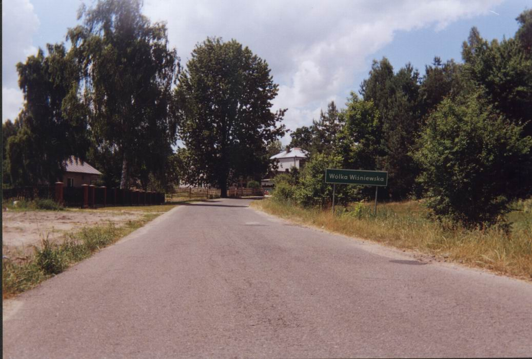 Wólka Wiśniewska - główna droga